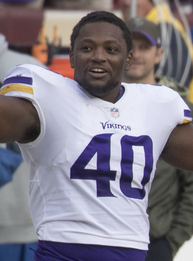 Vikings at Redskins 11/12/17